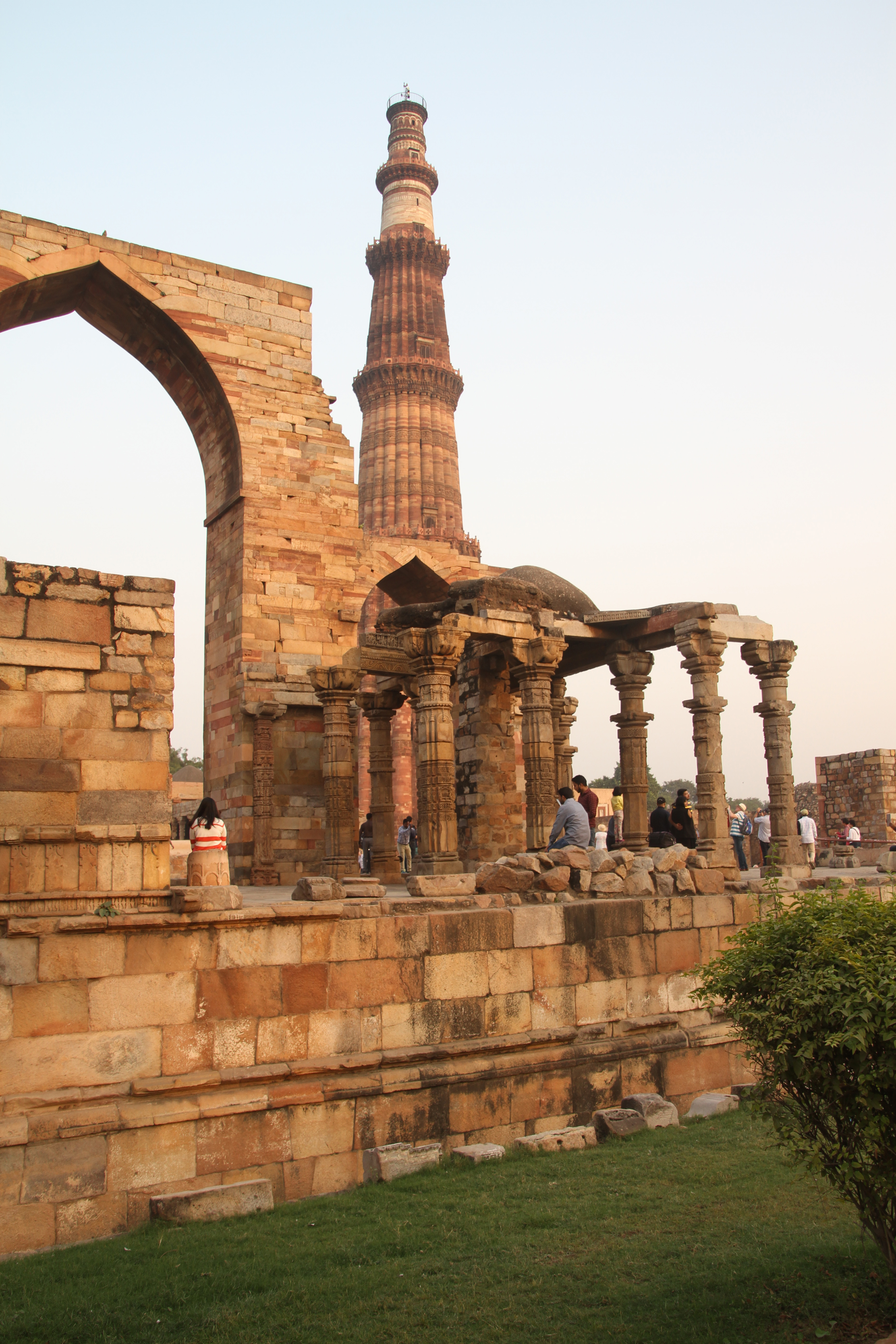 Qutb Minar